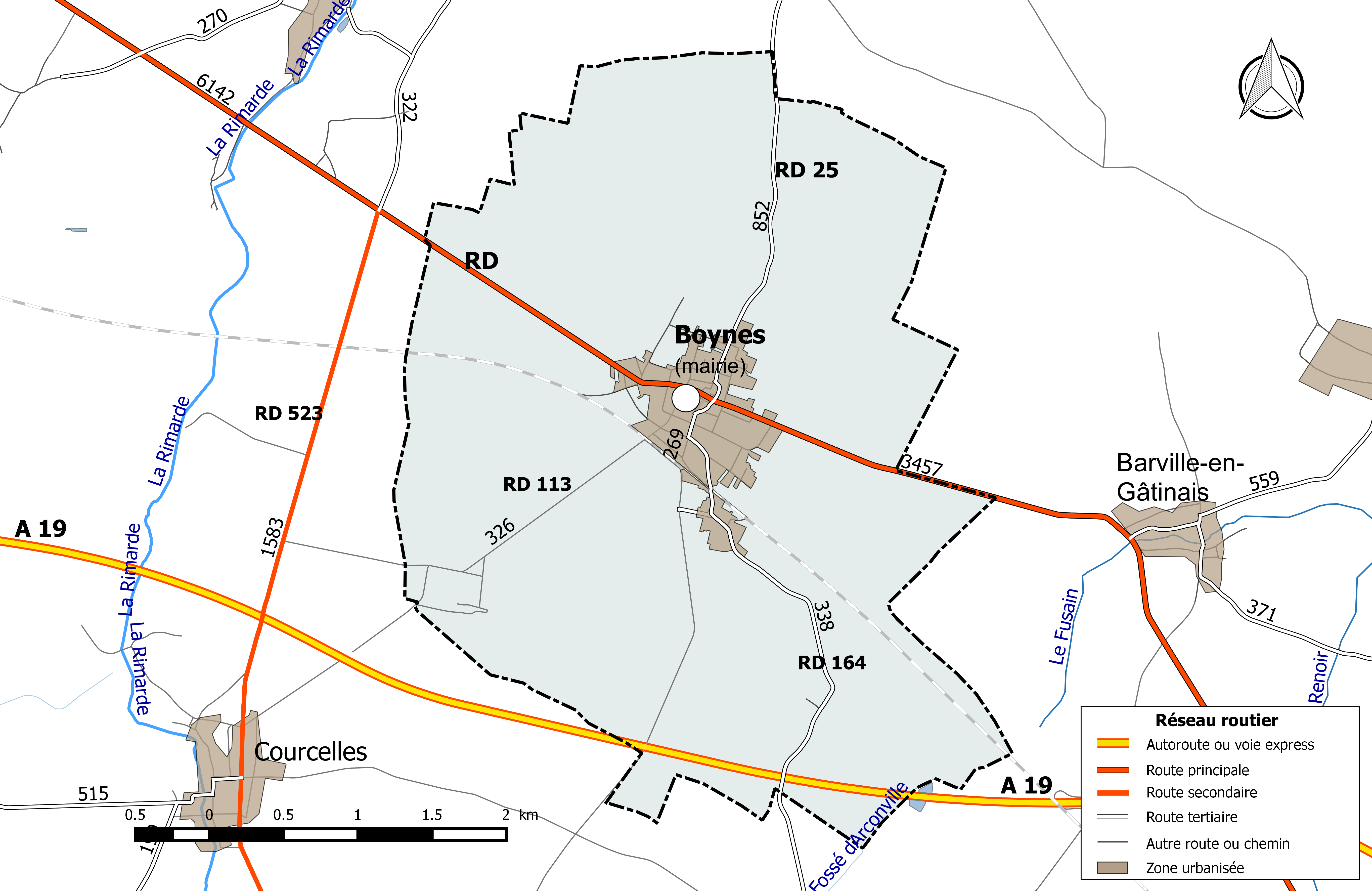 Carte du réseau routier de la commune de Boynes.